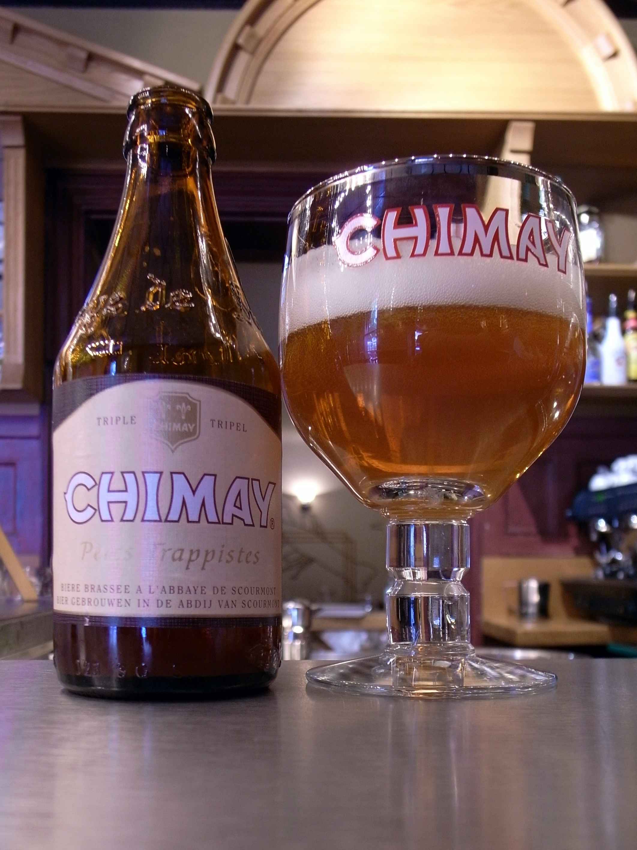 Chimay Triple, en av de vanligaste trappistölen.